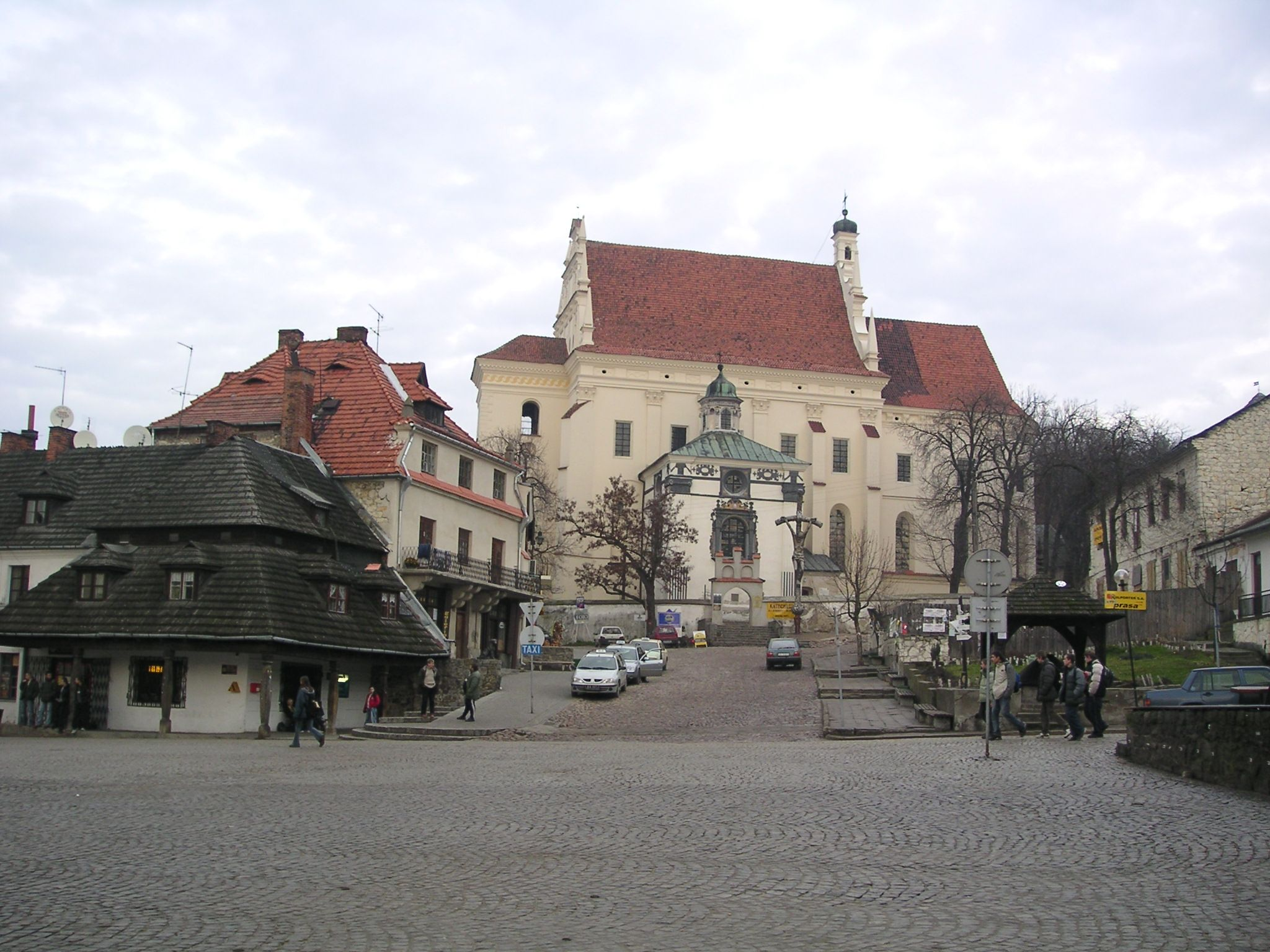 Kazimierz Dolny, Poland Author: Wojsyl